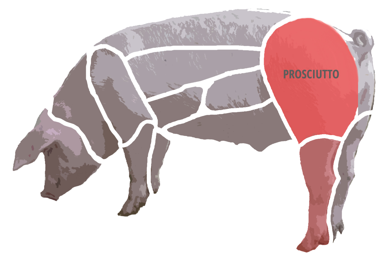 file originale: autore: 사용자:Jjw licenza: CC-BY-SA-3.0-IT